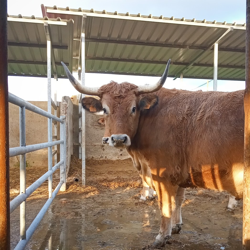 Cruce entre asturiana de montaña y de valles. Experimento reciente del SERIDA